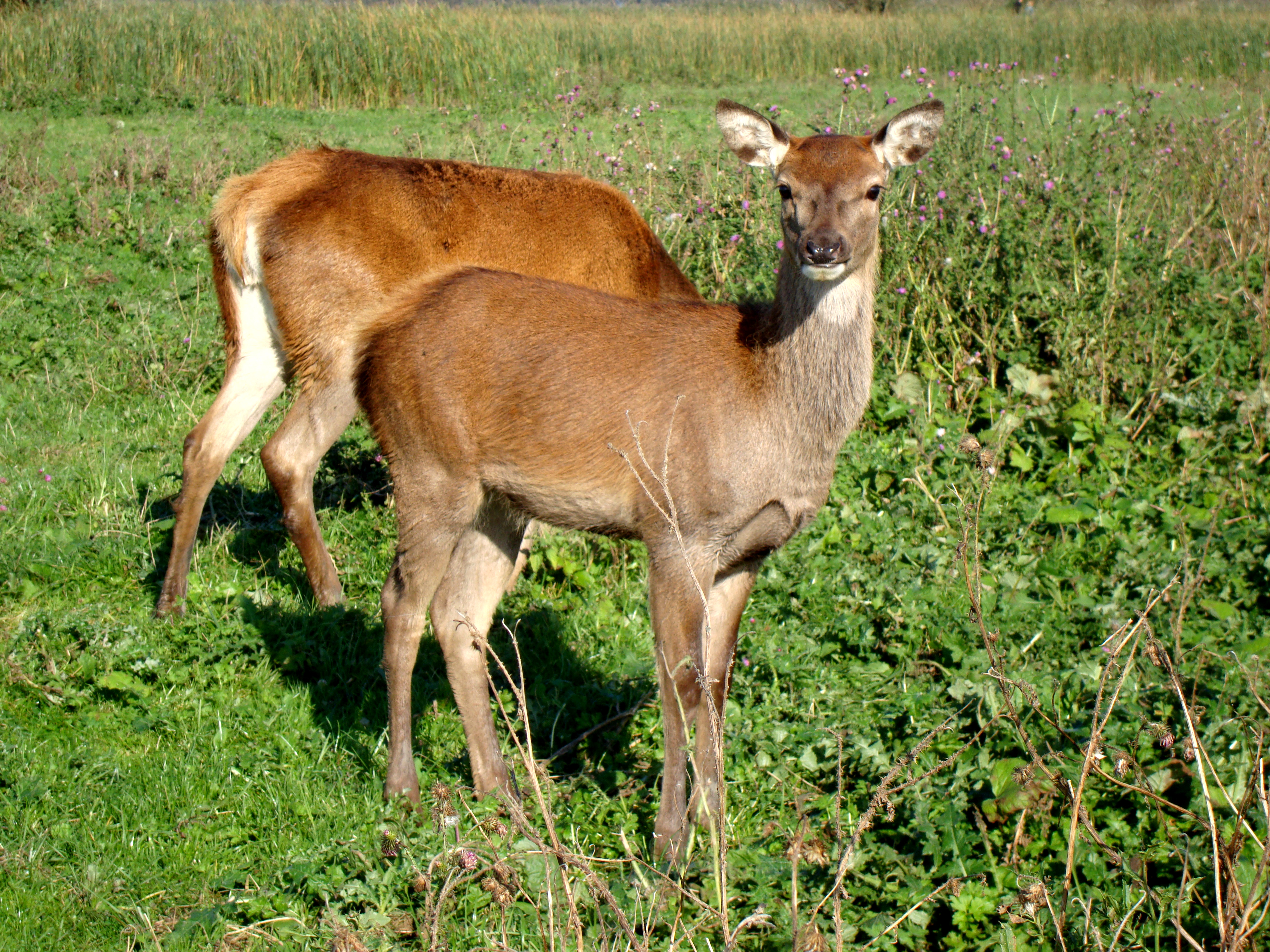 Edelhert in de Oostvaardersplassen